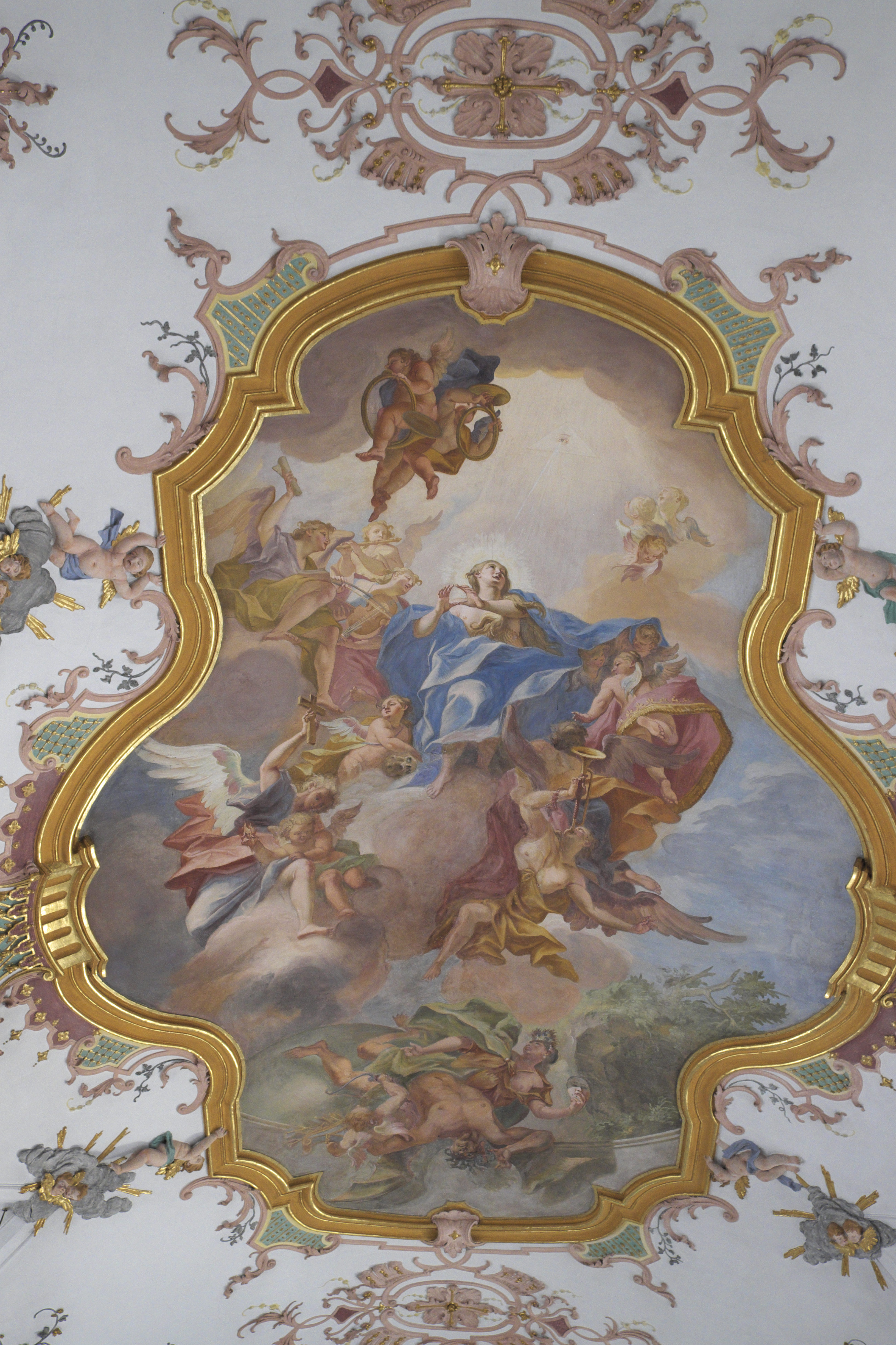 Katholische Pfarrkirche Mariä Himmelfahrt in Walleshausen, einem Ortsteil von Geltendorf im Landkreis Landsberg am Lech (Oberbayern/Bayern), Deckenfresko im Langhaus von Johann Georg Wolcker; Darstellung: Glorie der Maria Magdalena